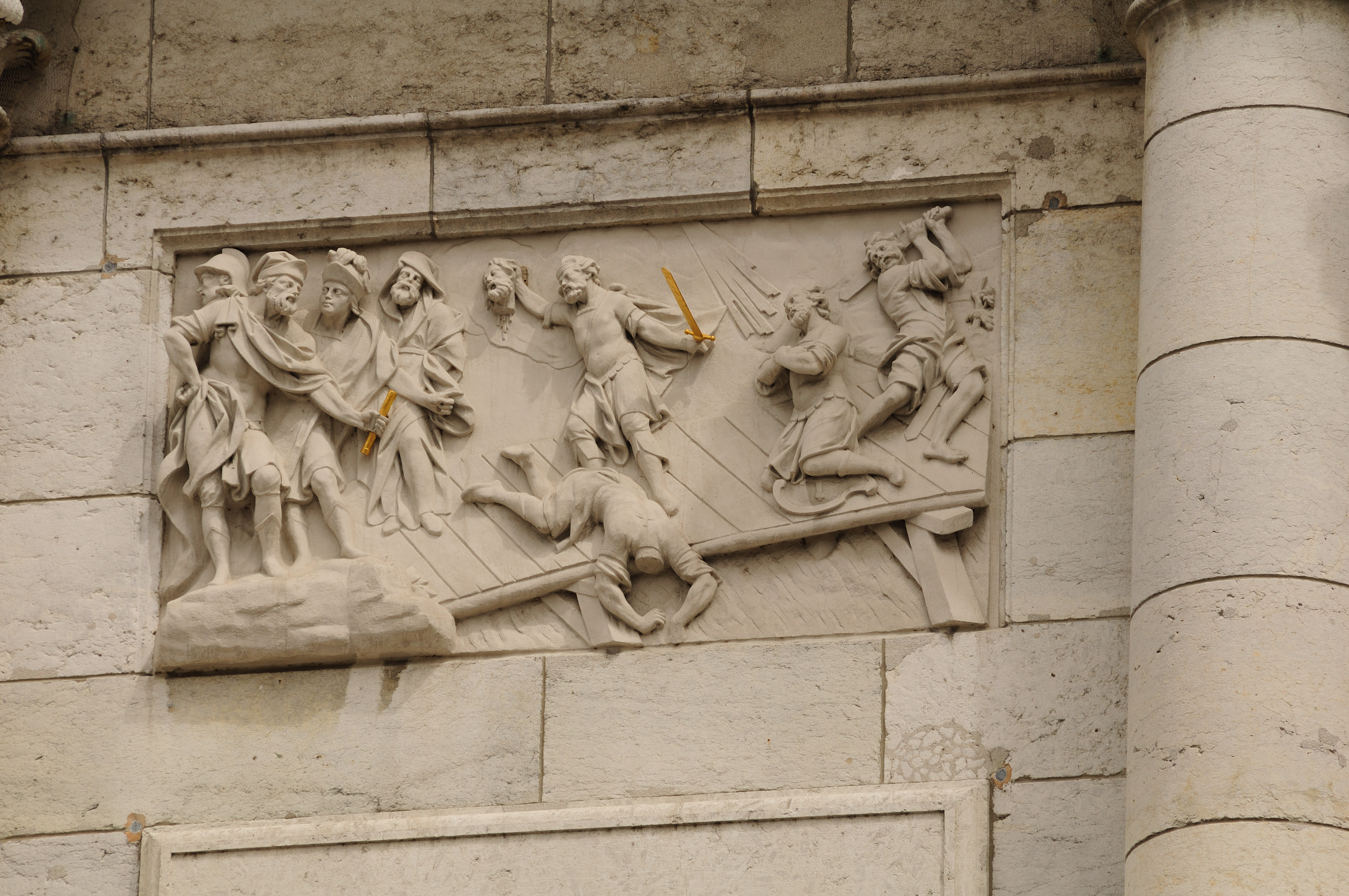 Solothurn: Relief der St. Ursenkathedrale (Westfassade)